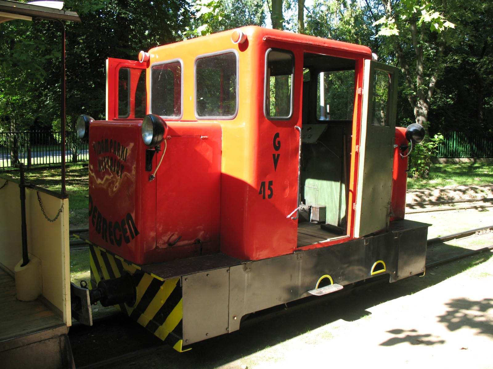 Ez a kép a debreceni állatkertben található kisvasut mozdonyát ábrázolja hátulról.